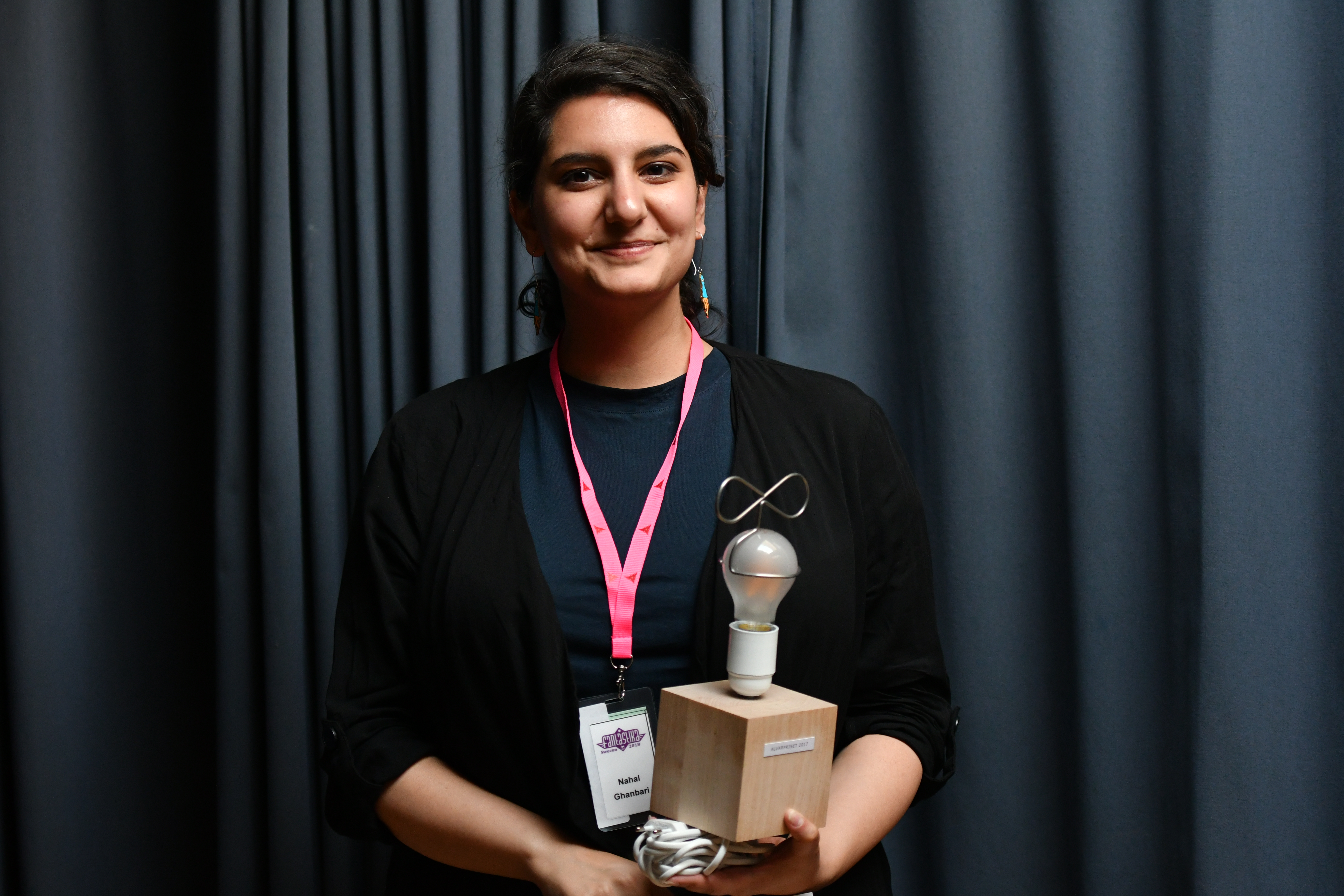 Nahal Ghanbari, årets Alvarpristagare, på Fantastika 2018, Swecon 2018.